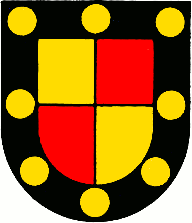 Wappen der Gemeinde Rochefort NE (CH)